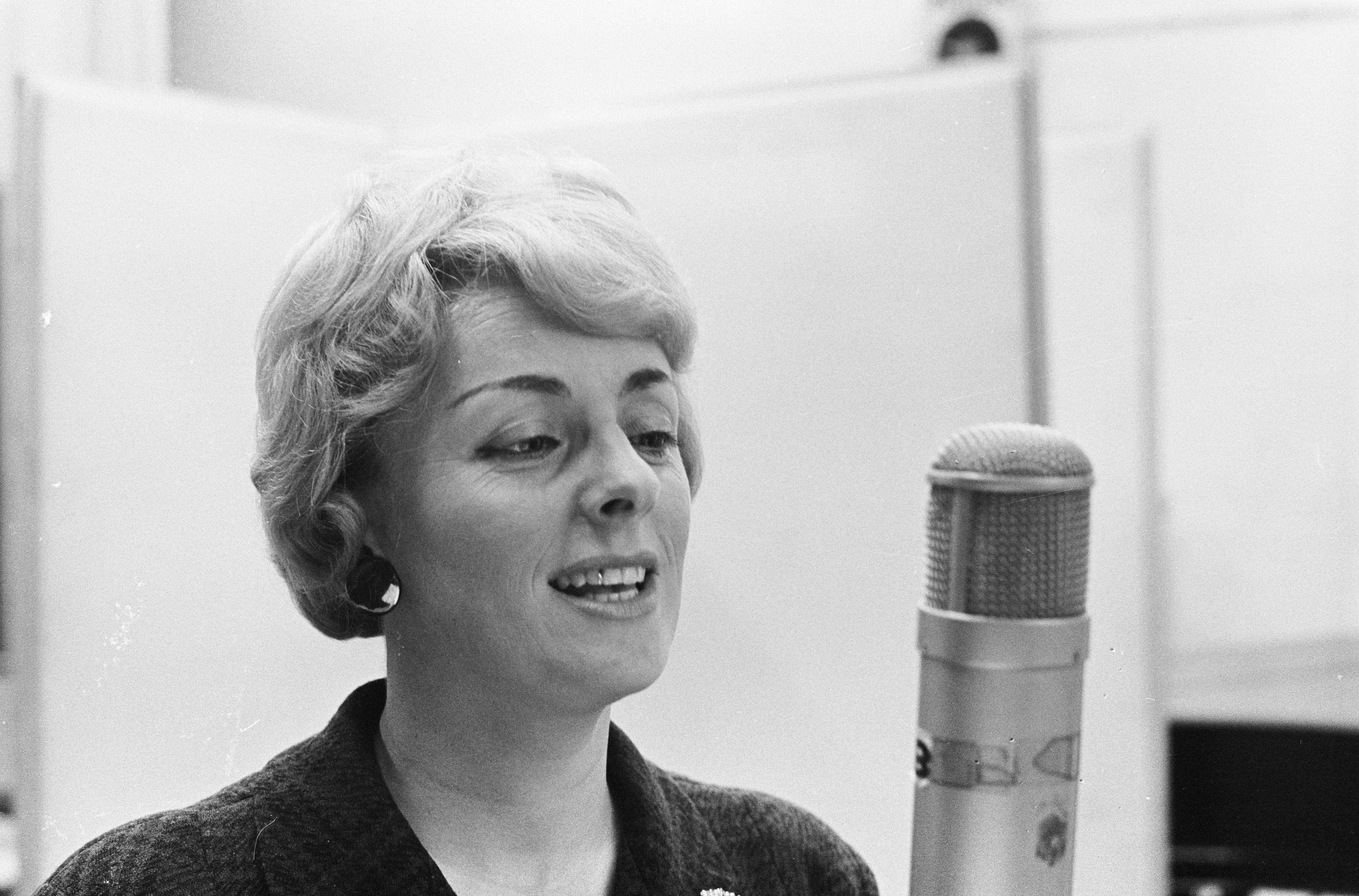 Collectie / Archief : Fotocollectie Anefo Reportage / Serie : [ onbekend ] Beschrijving : Annie Palmen heeft in de Phonogramstudio te Hilversum het uitgekozen Eurovisie Songfestivalliedje opgenomen Datum : 5 februari 1963 Locatie : Hilversum Trefwoorden : artiesten, muziekstudios, opnamen, songfestivals Persoonsnaam : Palmen, Annie Fotograaf : Gelderen, Hugo van / Anefo Auteursrechthebbende : Nationaal Archief Materiaalsoort : Negatief (zwart/wit) Nummer archiefinventaris : bekijk toegang 2.24.01.05 Bestanddeelnummer : 914-7874